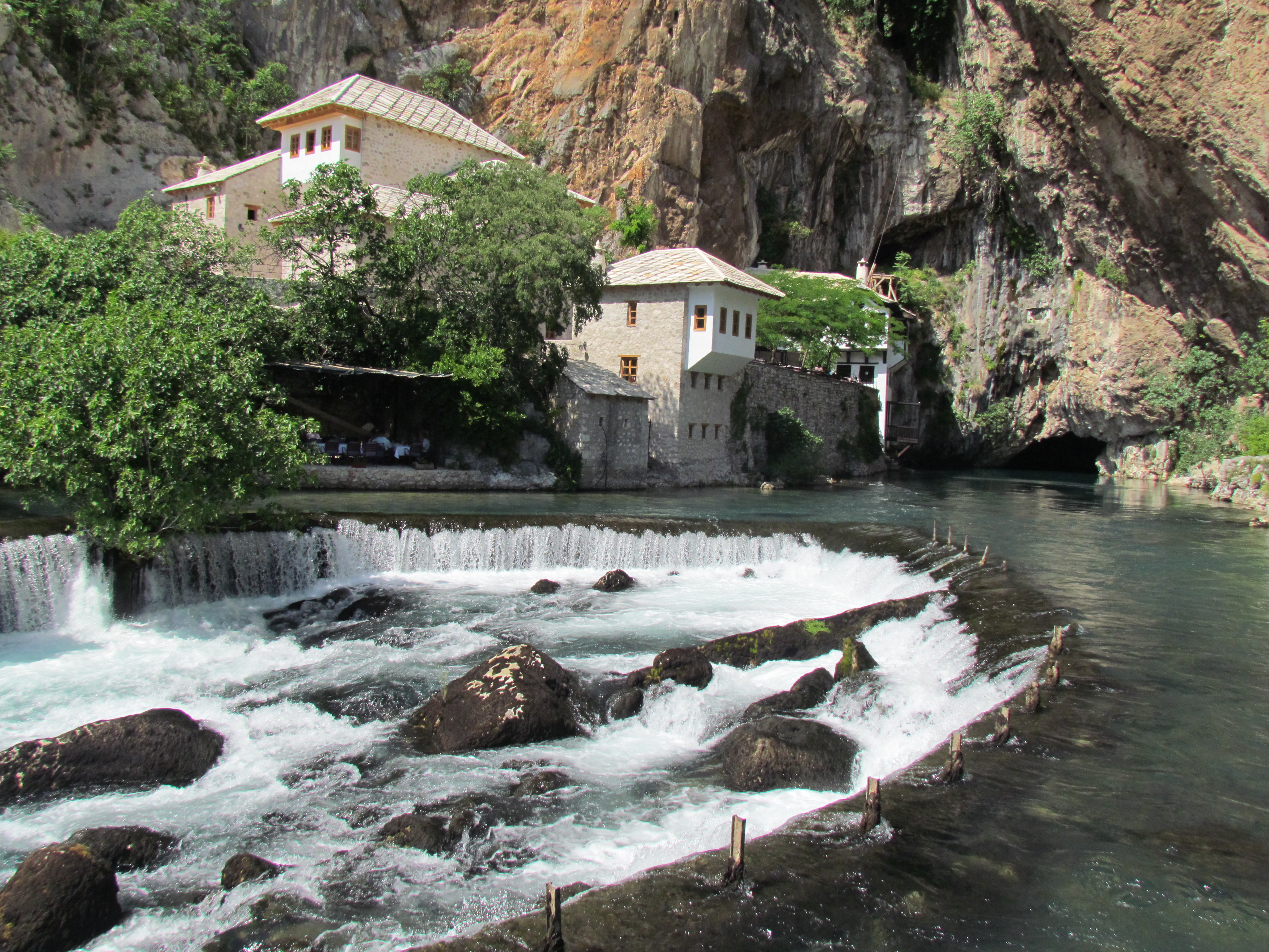 Tekija pri izviru Bune v Blagaju pri Mostarju (BiH)